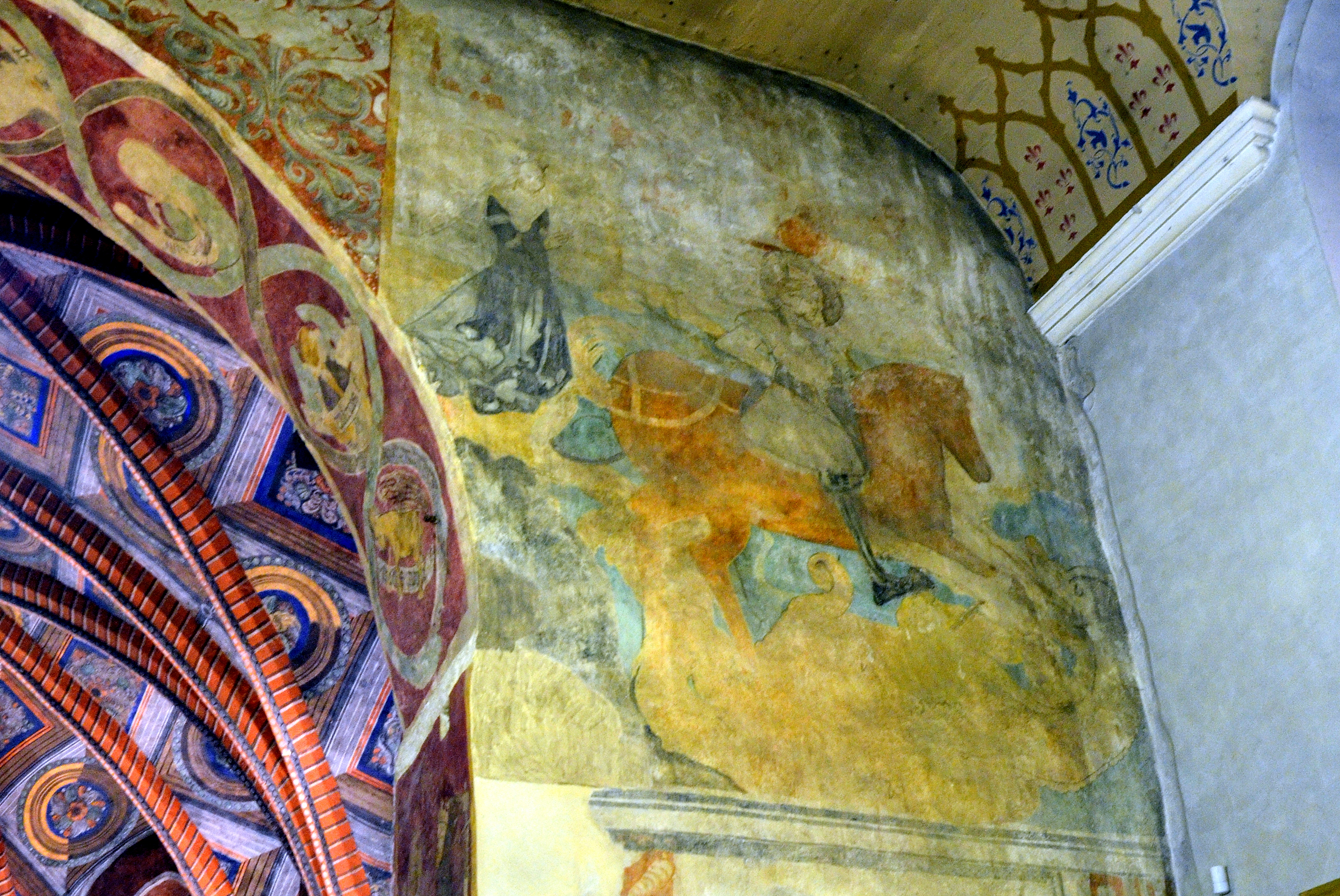 Deutsche Malerei der Gotik - Die Wandmalereien der Stanislaus-Kirche in Alt Bielitz mit Ergänzungen aus dem 15 - Bildtafeln mit dem heiligen Georg.